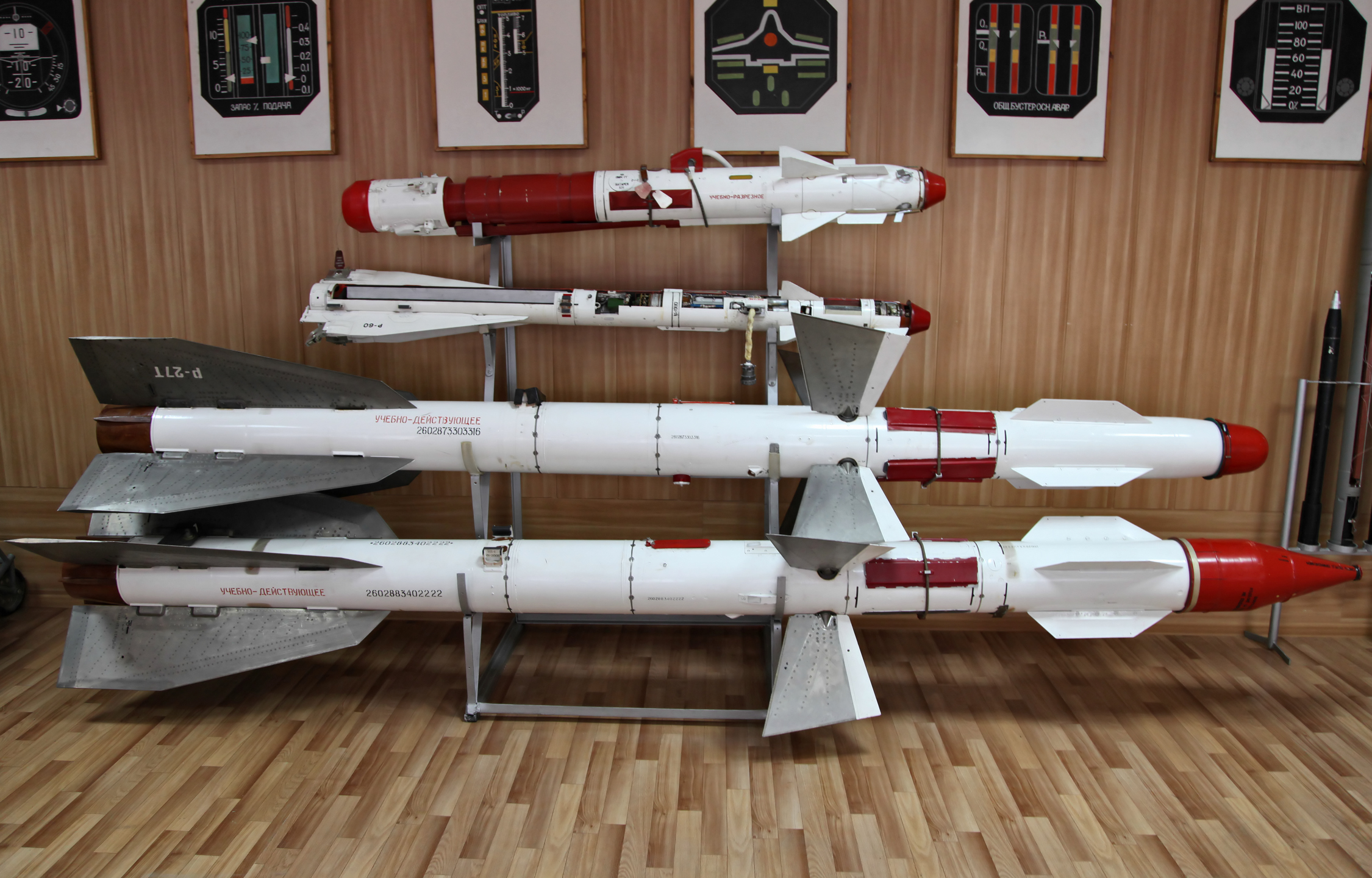 Управляемые ракеты малой дальности Р-73 и Р-60, средней дальности Р-27Т и Р-27Р (R-73, R-60, R-27T and R-27R missiles)